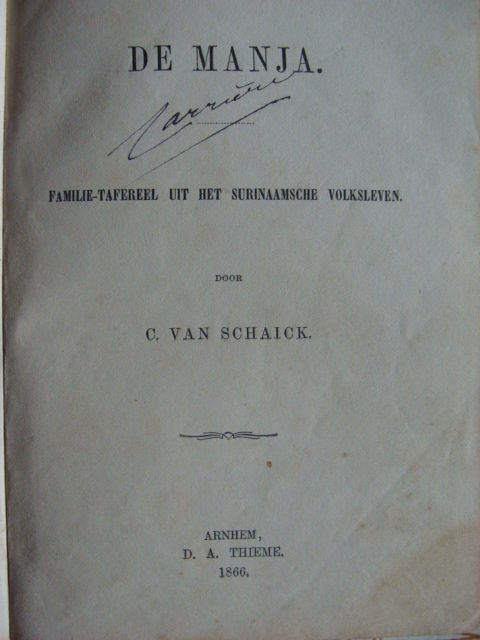 Titelblad van de roman 'De Manja, een familie-tafereel uit het Surinaamsche volksleven' door C. van Schaick uit 1866